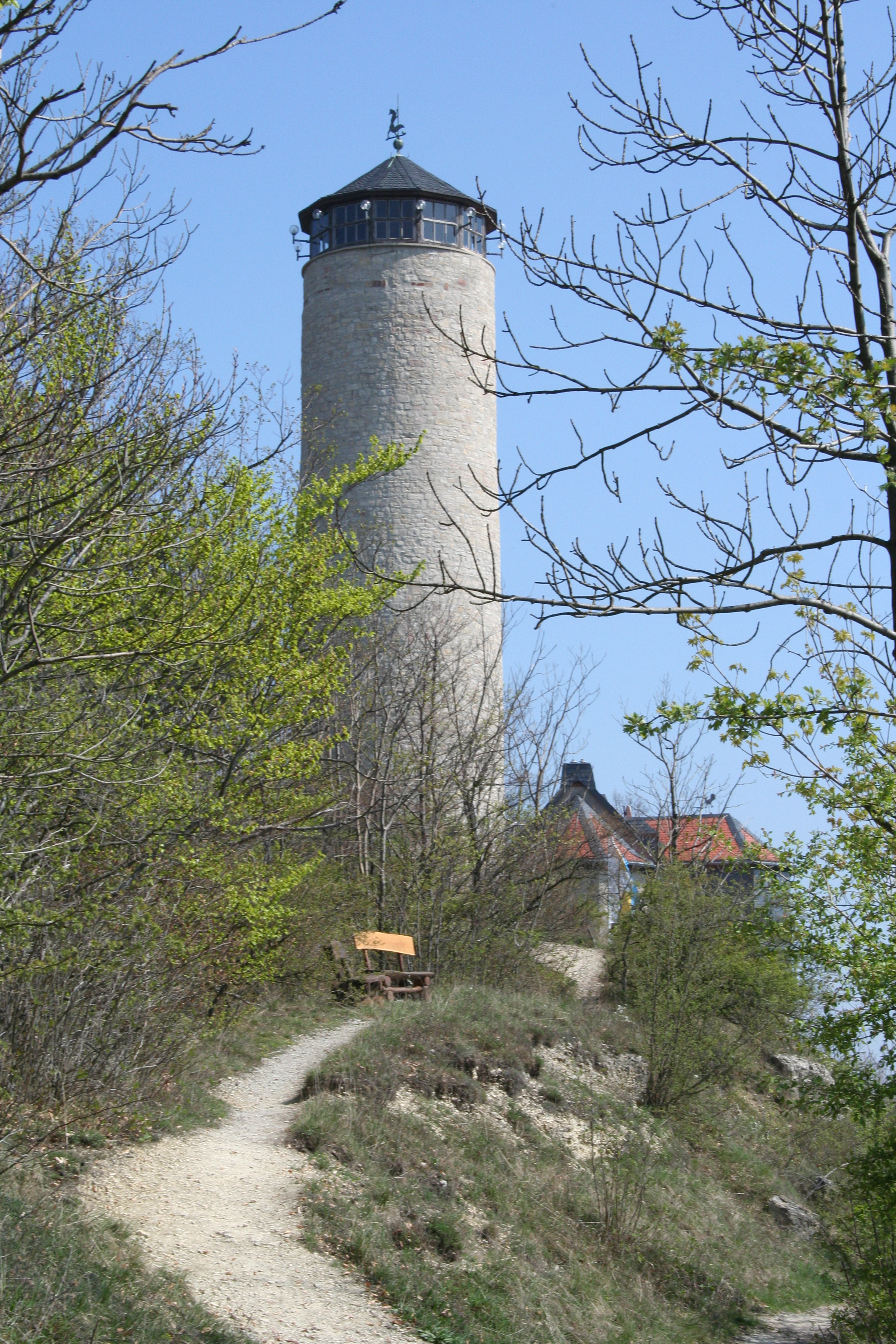 Jena Fuchsturm - Blick vom Hausberg